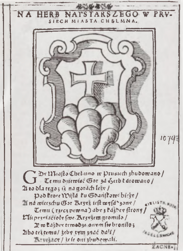 Herb miasta Chelmno. "Prawa chełmińskiego poprawionego ksiąg pięcioro", Poznań 1623